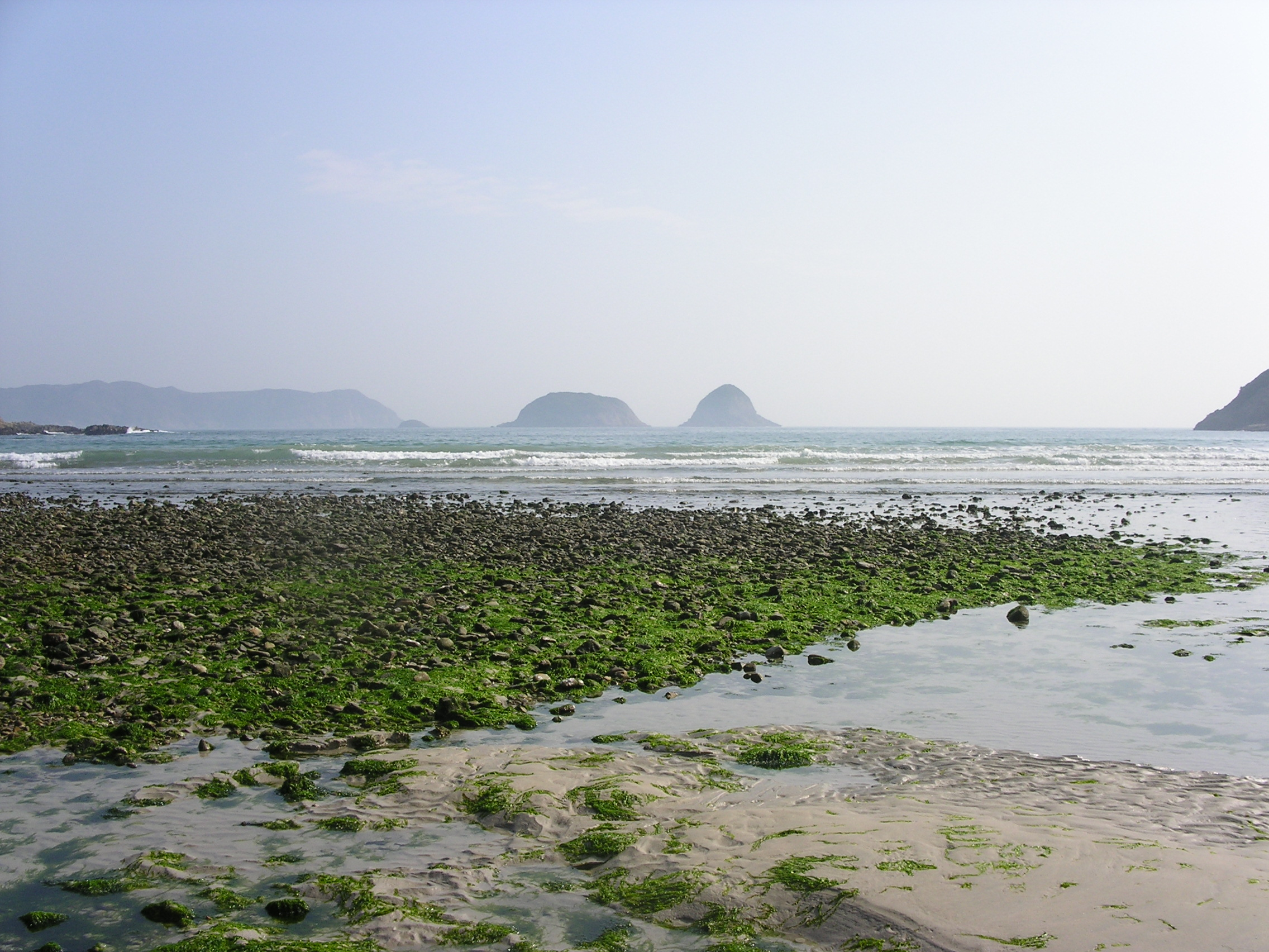 Sea in Sai Wan,Hong Kong.西灣對出的大洲及尖洲，已經成為地標性的海景了。